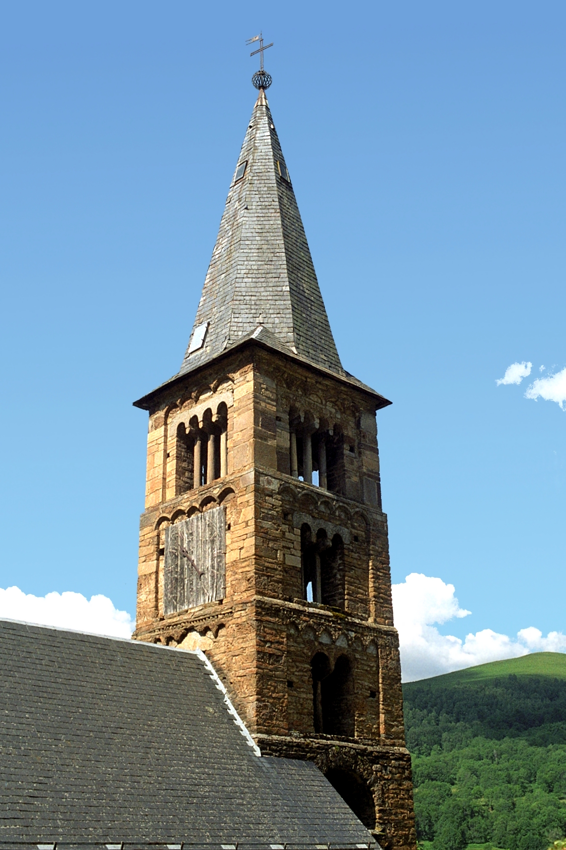 France - Pyrénées - Haute Garonne - Église Saint-Barthélemy de Saccourvielle